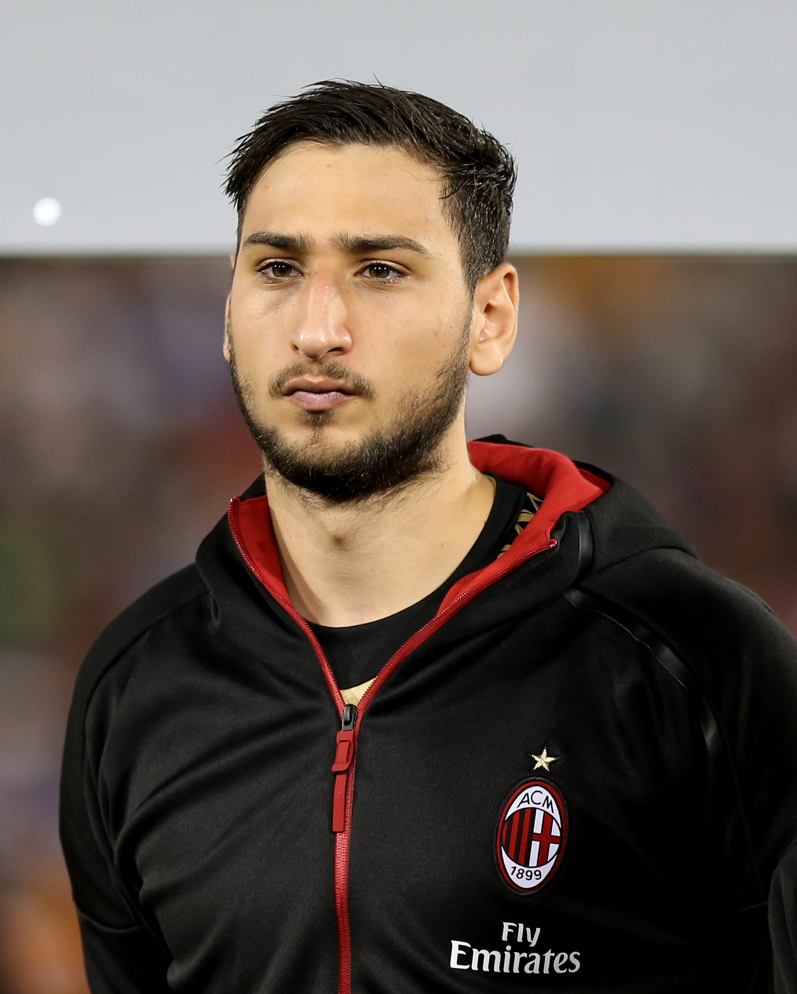 AC Milan's goalkeeper Gianluigi Donnarumma during their Italian Super Cup match against Juventus in Doha, Qatar. Doha Stadium Plus - Vinod Divakaran